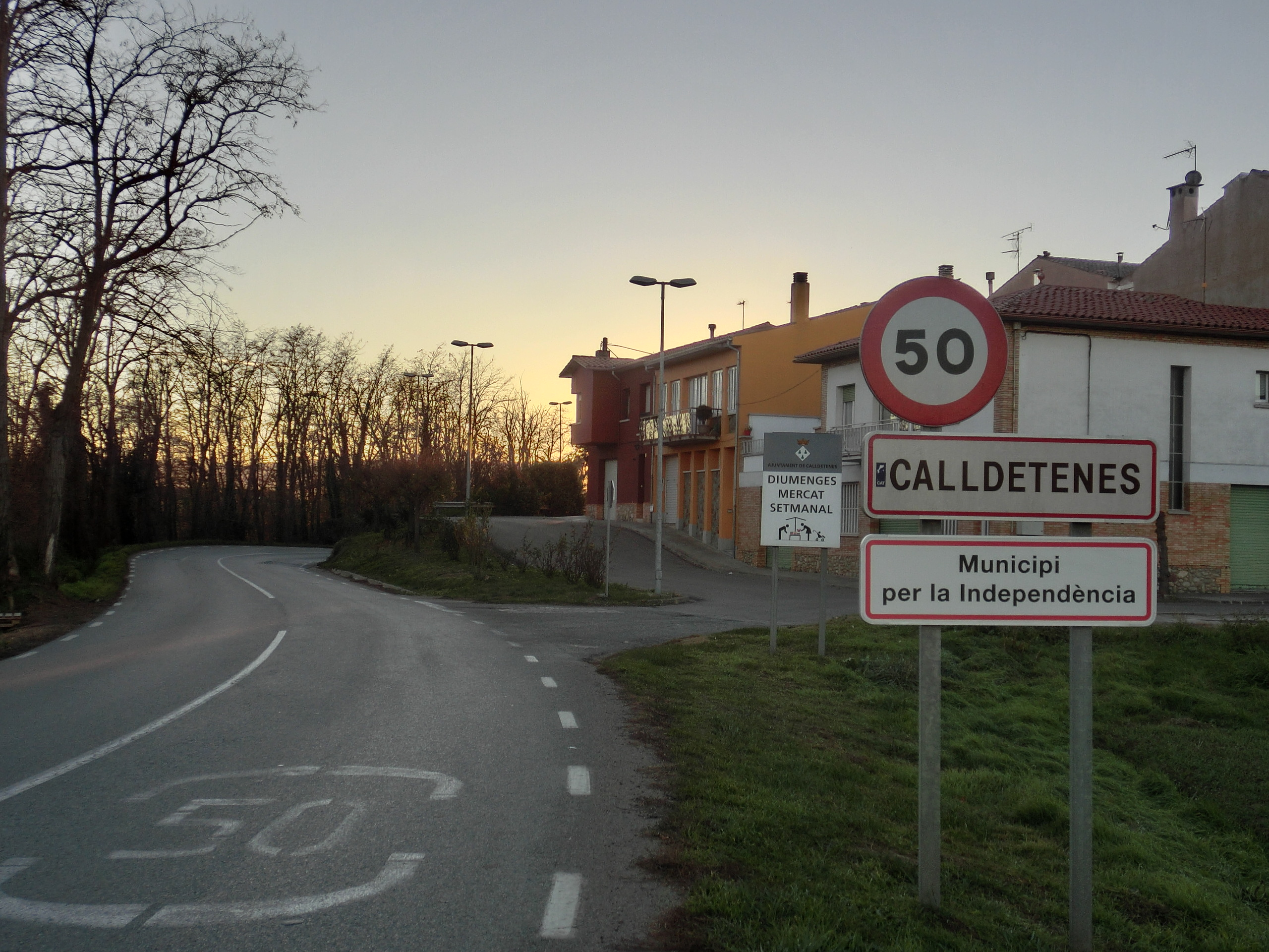 Rètol de "Municipi per la Independència" a l'entrada a Calldetenes (direcció Vic), Osona, Catalunya, Països Catalans.